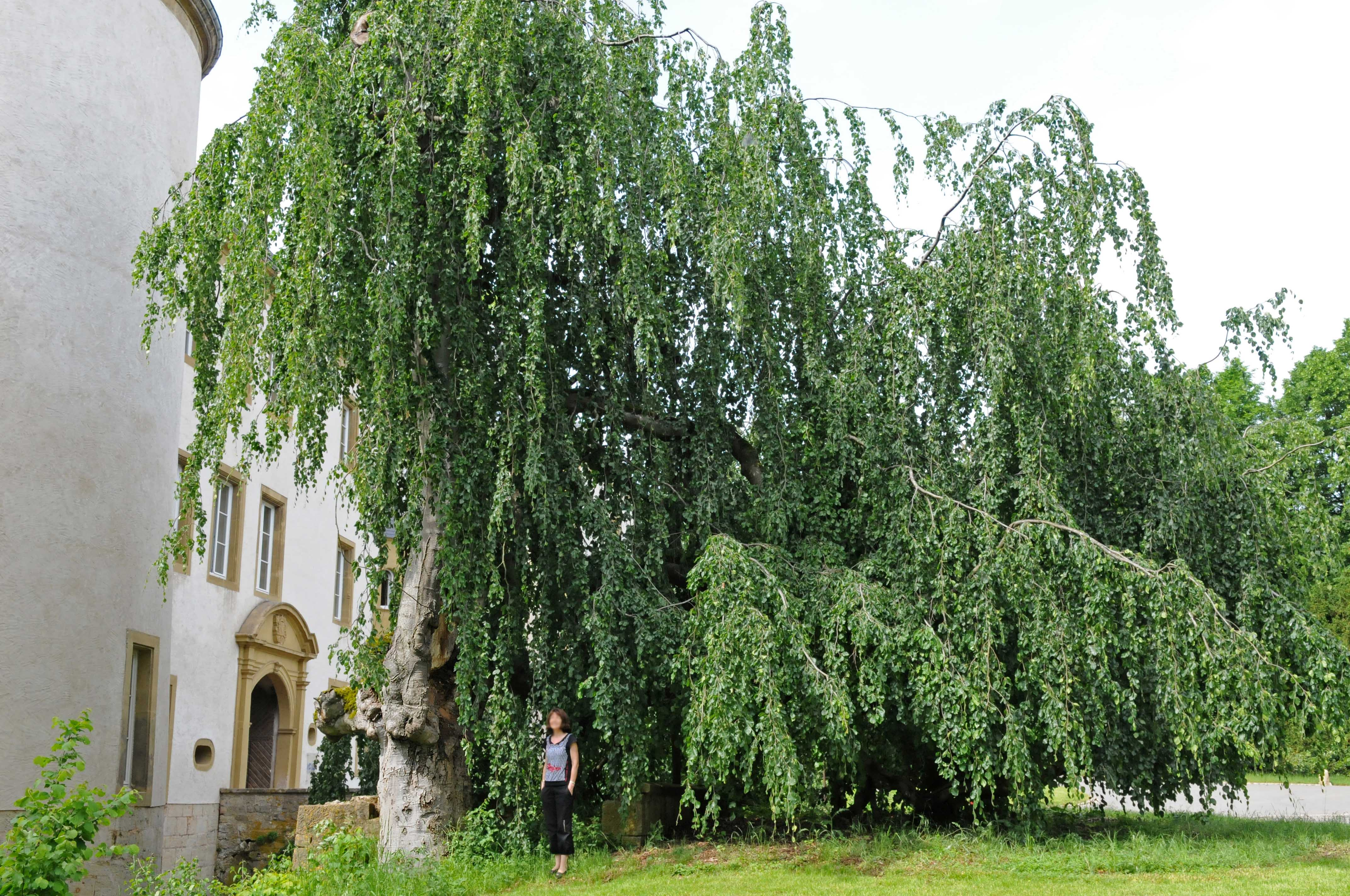 Trauerbuch zu Suessem.